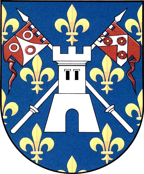 Znak obce Velichov